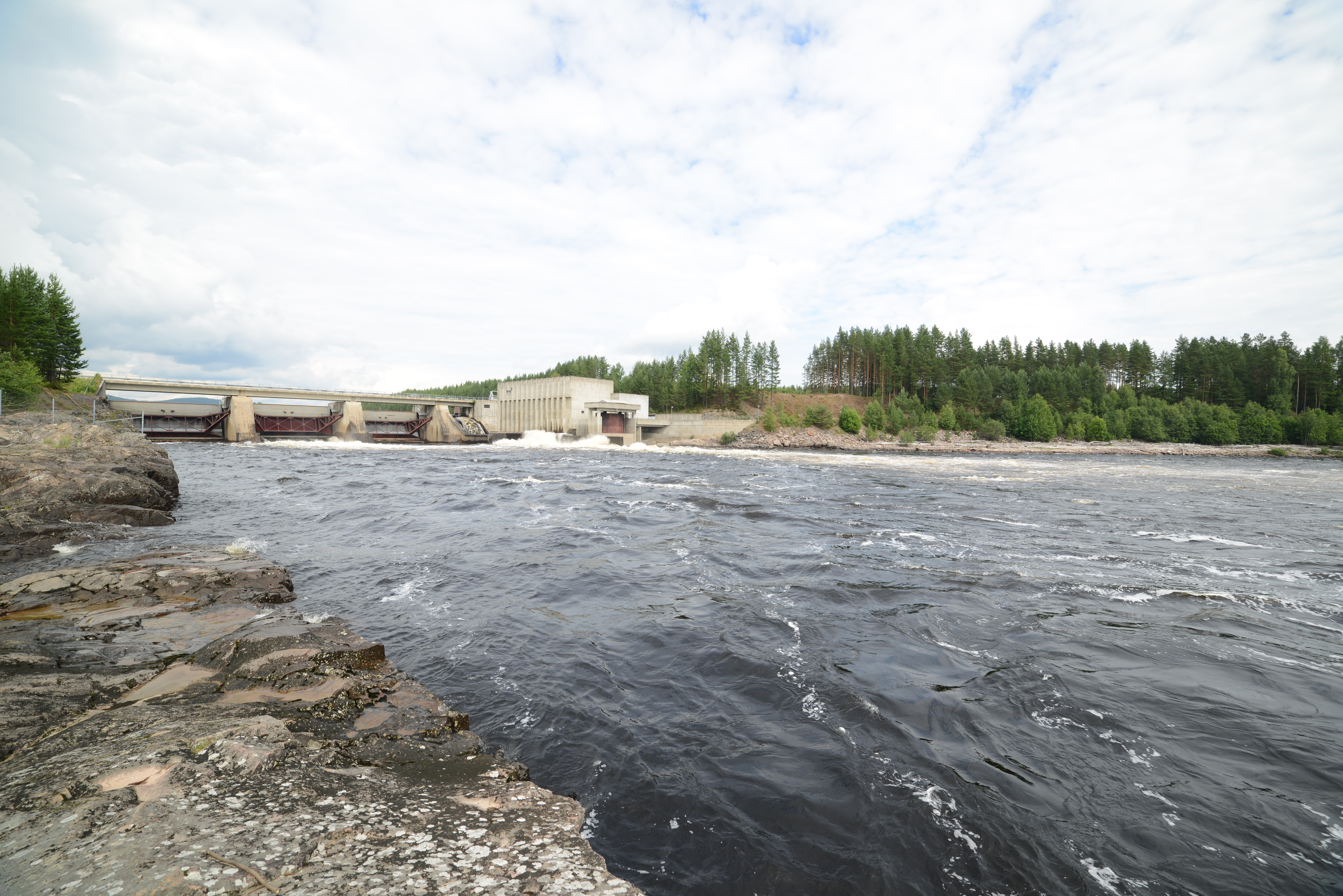 Braskereidfoss kraftverk